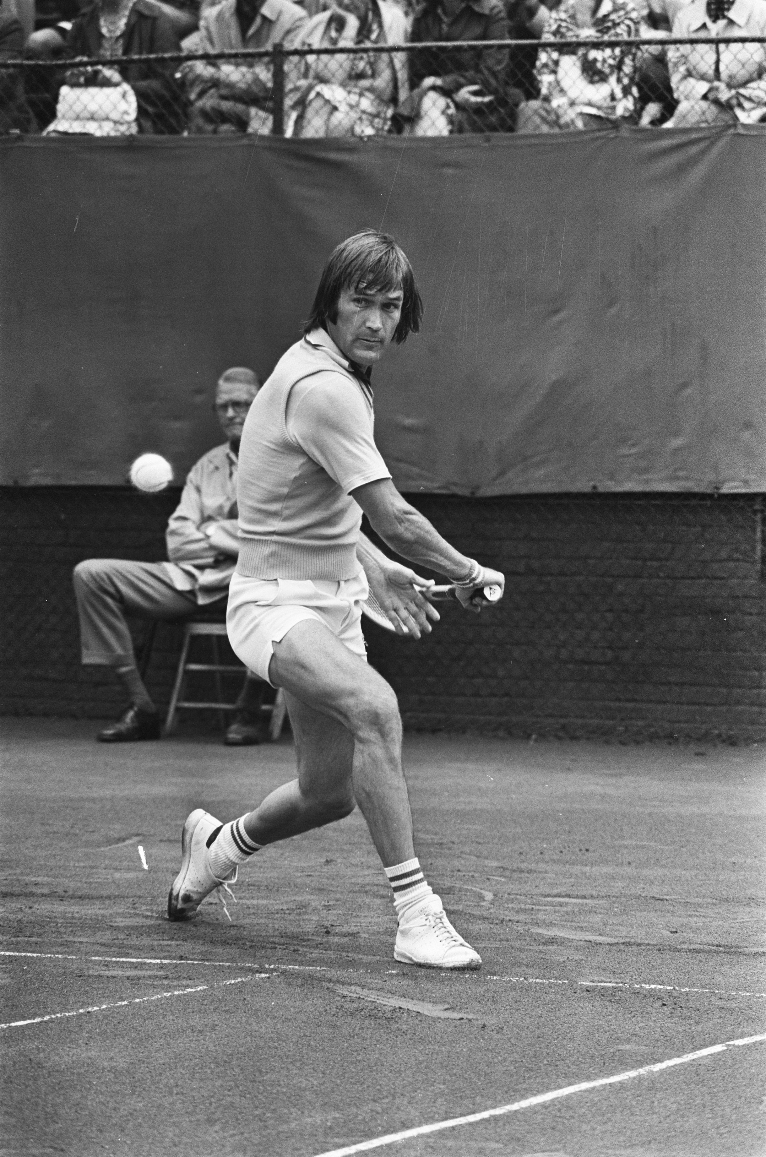 Collectie / Archief : Fotocollectie Anefo Reportage / Serie : Internationale tenniskampioenschappen 1975 op het Melkhuisje in Hilversum Beschrijving : Franulovic (Joegoslavië) in aktie Datum : 18 juli 1975 Locatie : Hilversum, Noord-Holland Trefwoorden : tennis, toernooien Persoonsnaam : Franuvolic, Zeljko Instellingsnaam : Melkhuisje, 't Fotograaf : Bert Verhoeff / Anefo Auteursrechthebbende : Nationaal Archief Materiaalsoort : Negatief (zwart/wit) Nummer archiefinventaris : bekijk toegang 2.24.01.05 Bestanddeelnummer : 928-0573